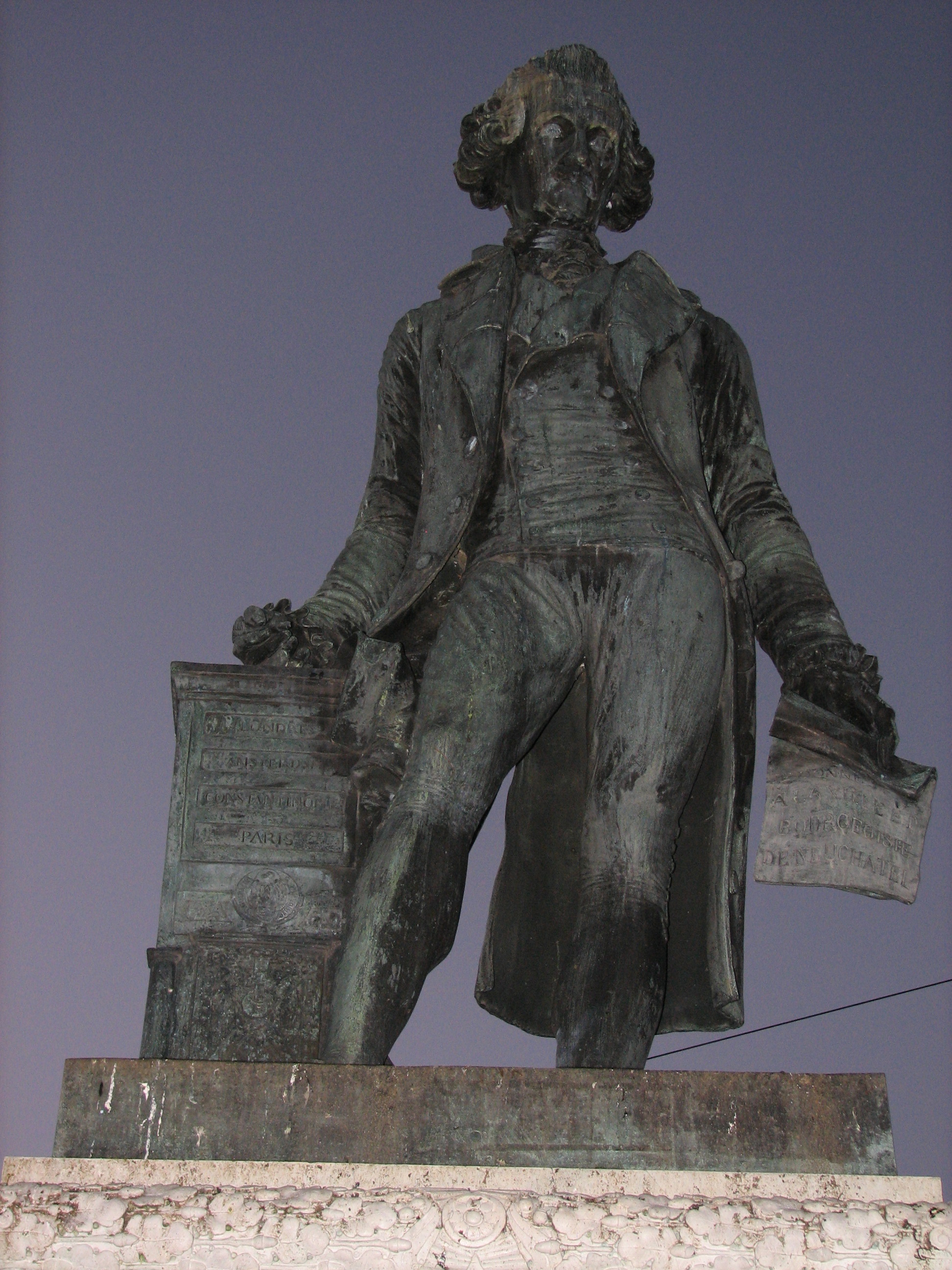 Statue de David de Pury, place Pury, Neuchâtel sculptée par David d'Angers en 1848.